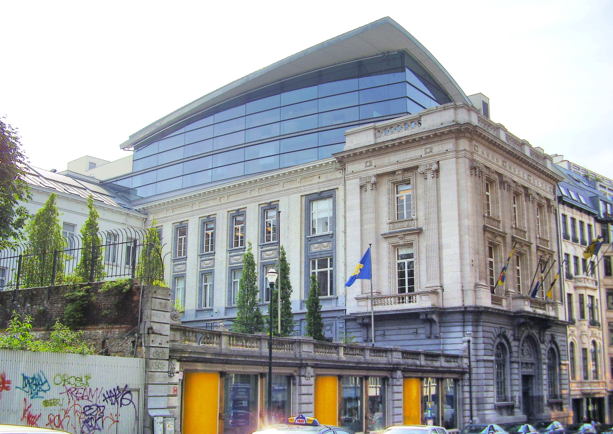 Description: Parlement de la région de Bruxelles-Capitale Author: User:Ben2 Date of creation: 08 juin 2006 Source: Photo personnelle